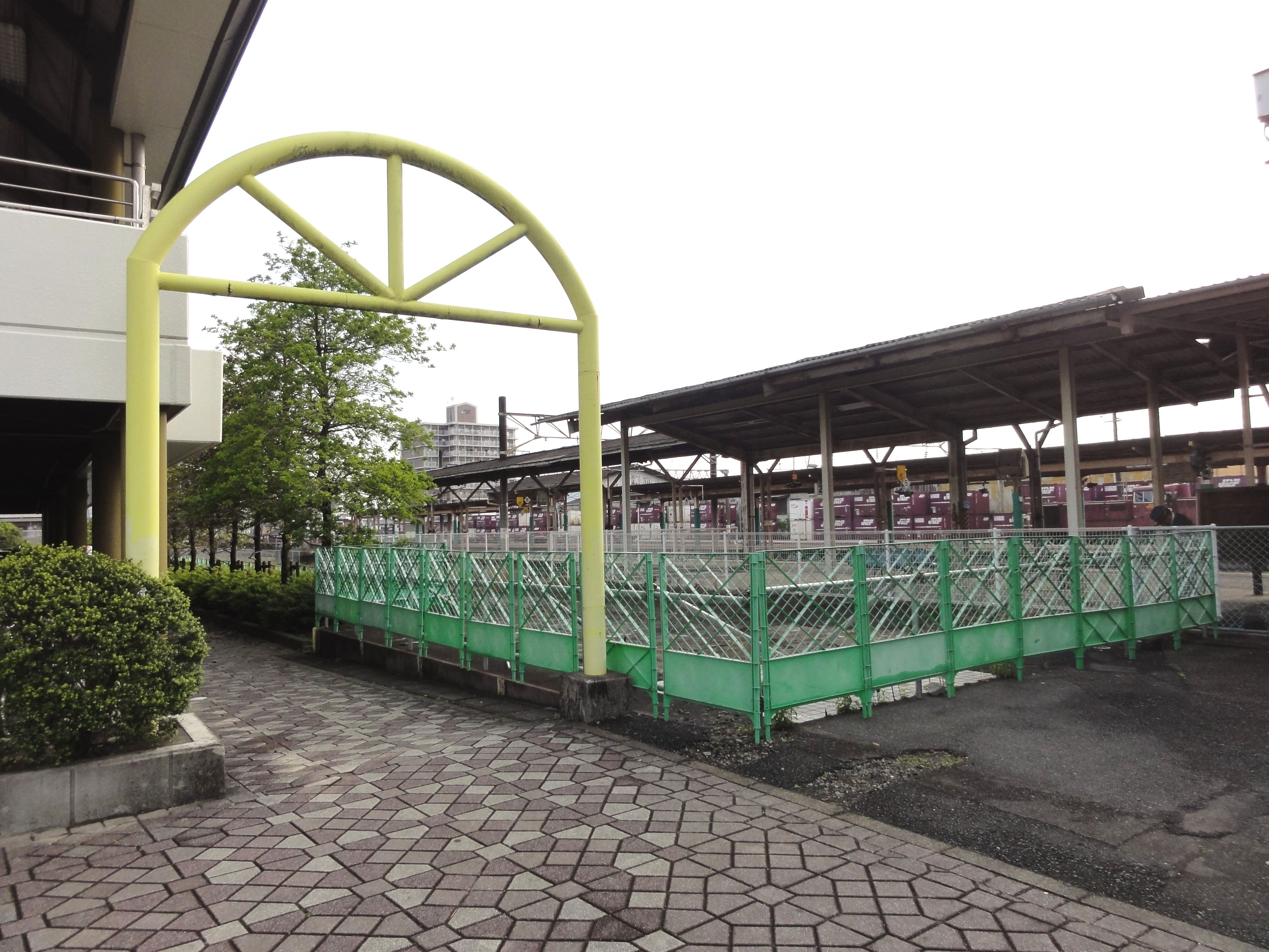 高千穂鉄道延岡駅跡地